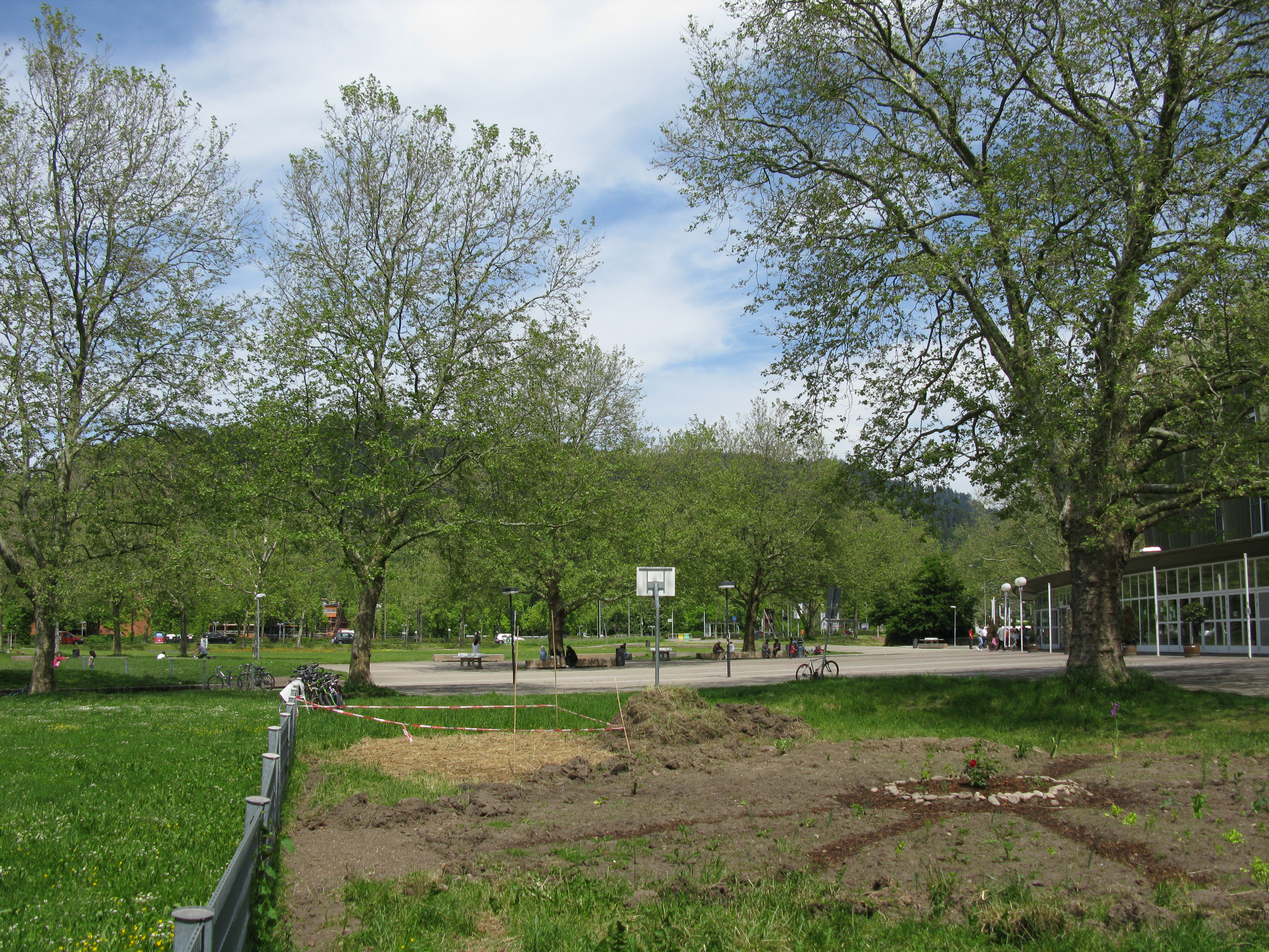 Grünspange bei der Stadthalle Freiburg mit urbanem Gartenbau